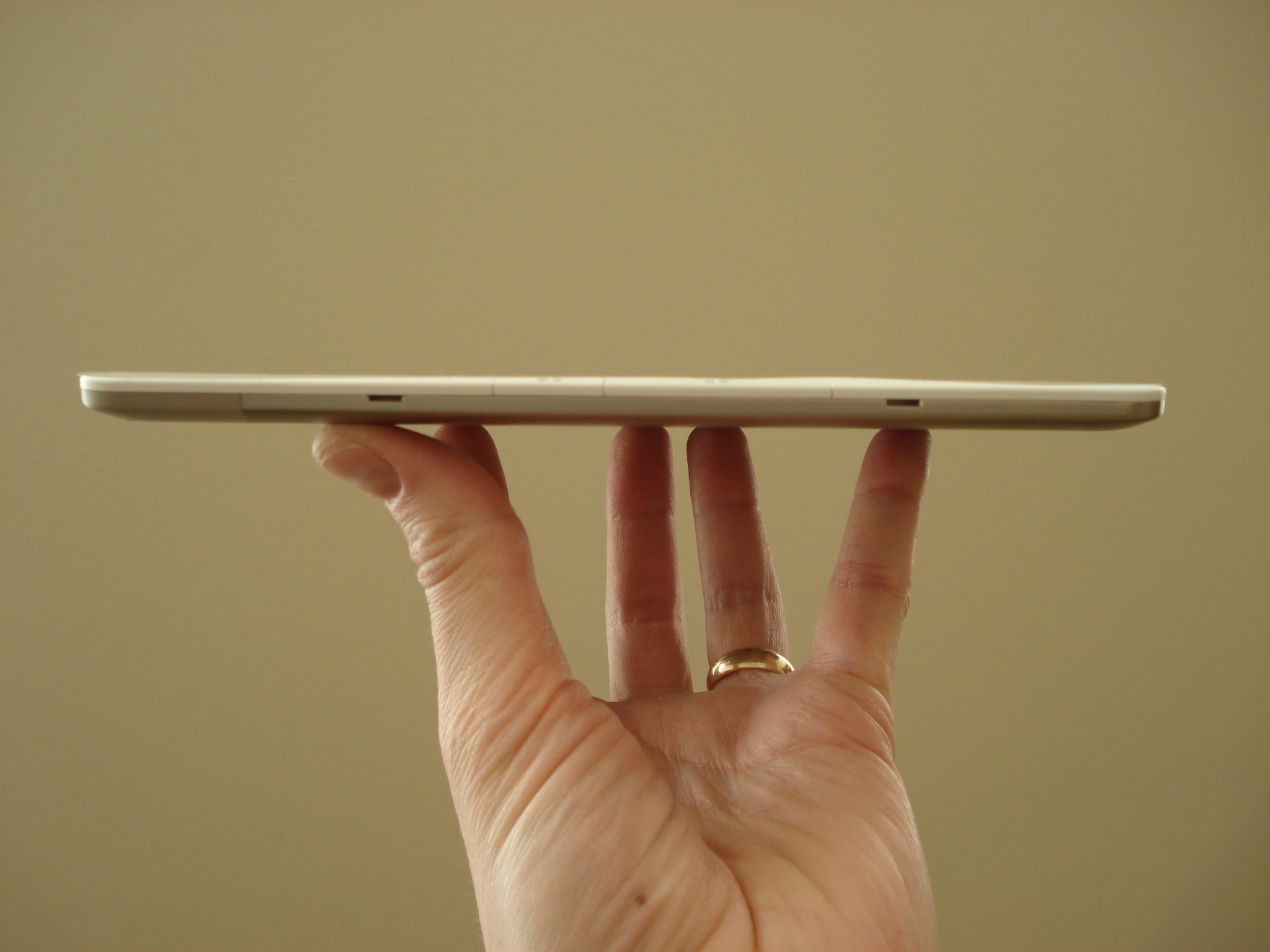 Kindle 2.0